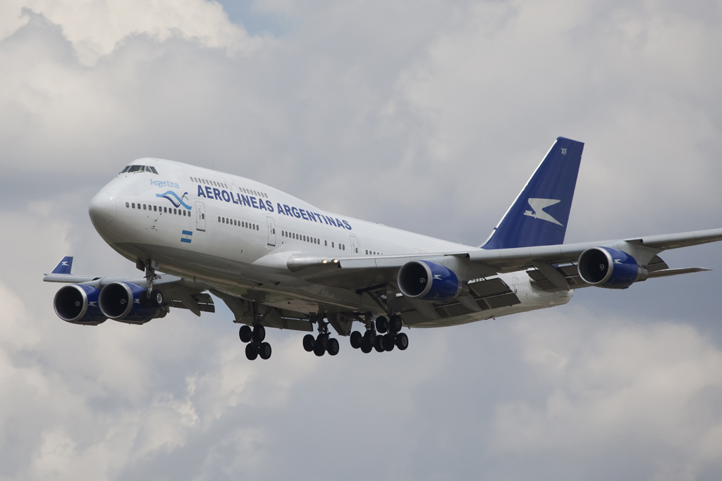 LV-AXF B747-400 Argentina